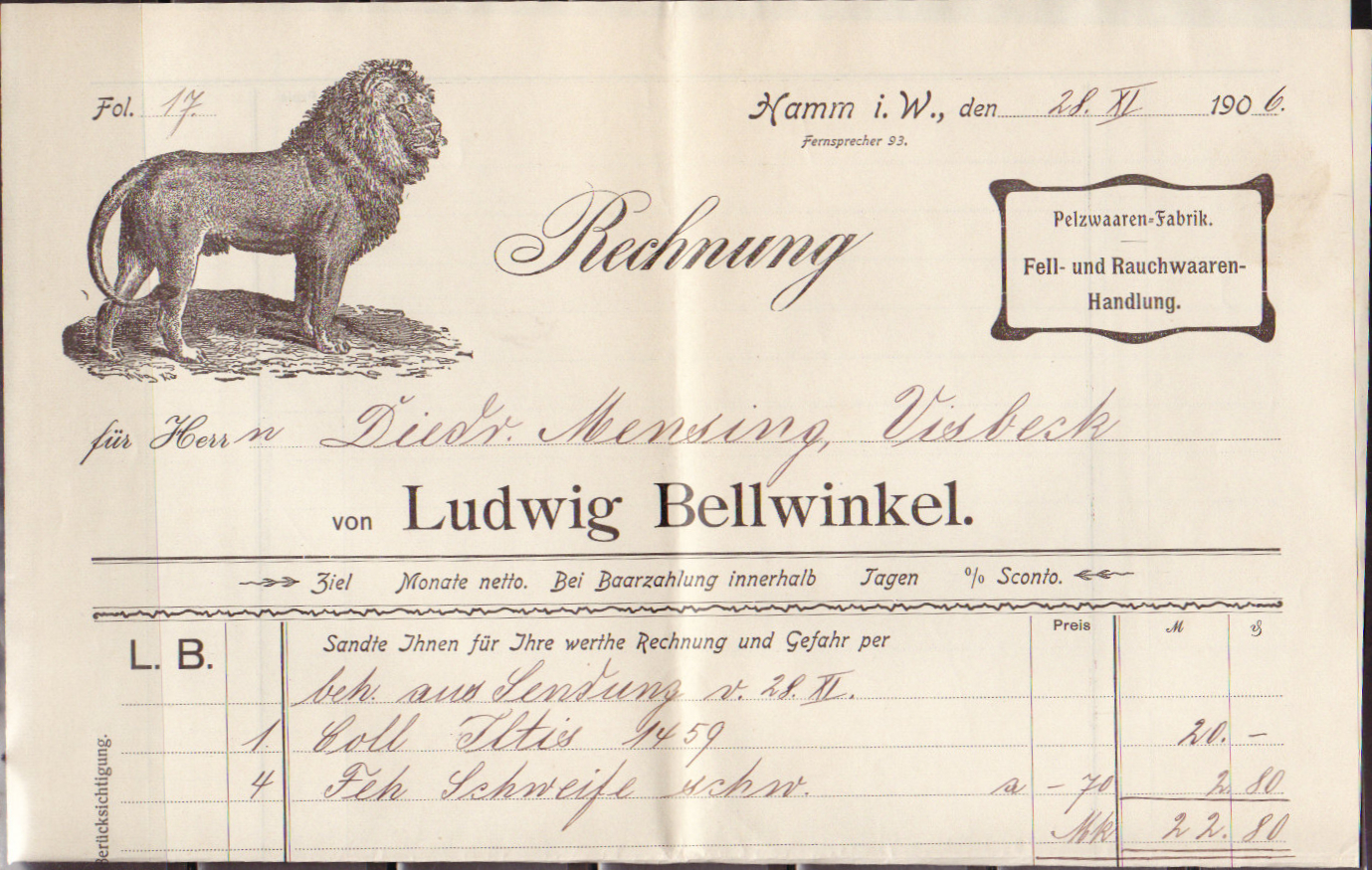 Rechnung des Pelzhändlers Ludwig Bellwinkel aus Hamm Pelzwaaren-Fabrik - Fell- und Rauchwaaren -Handlung Fol. 17. Hamm i. W., den 28.XI.1906 Fernsprecher 93. Rechnung für Herrn Diedr. Mensing, Visbeck von Ludwig Bellwinkel. →→ Ziel...Monate netto. Bei Baarzahlung innerhalb...Tagen...% Skonto. ←← L. B. sandte Ihnen für Ihre werthe Rechnung und Gefahr per beh. aus Sendung v. 28. XI. 1 Coll. Iltis 1459 20 Mark (Iltiskollier, in anderer Rechnung ausgeschrieben) 4 Feh Schweife schw. á -,70 2,80 Mark MK. 22,80